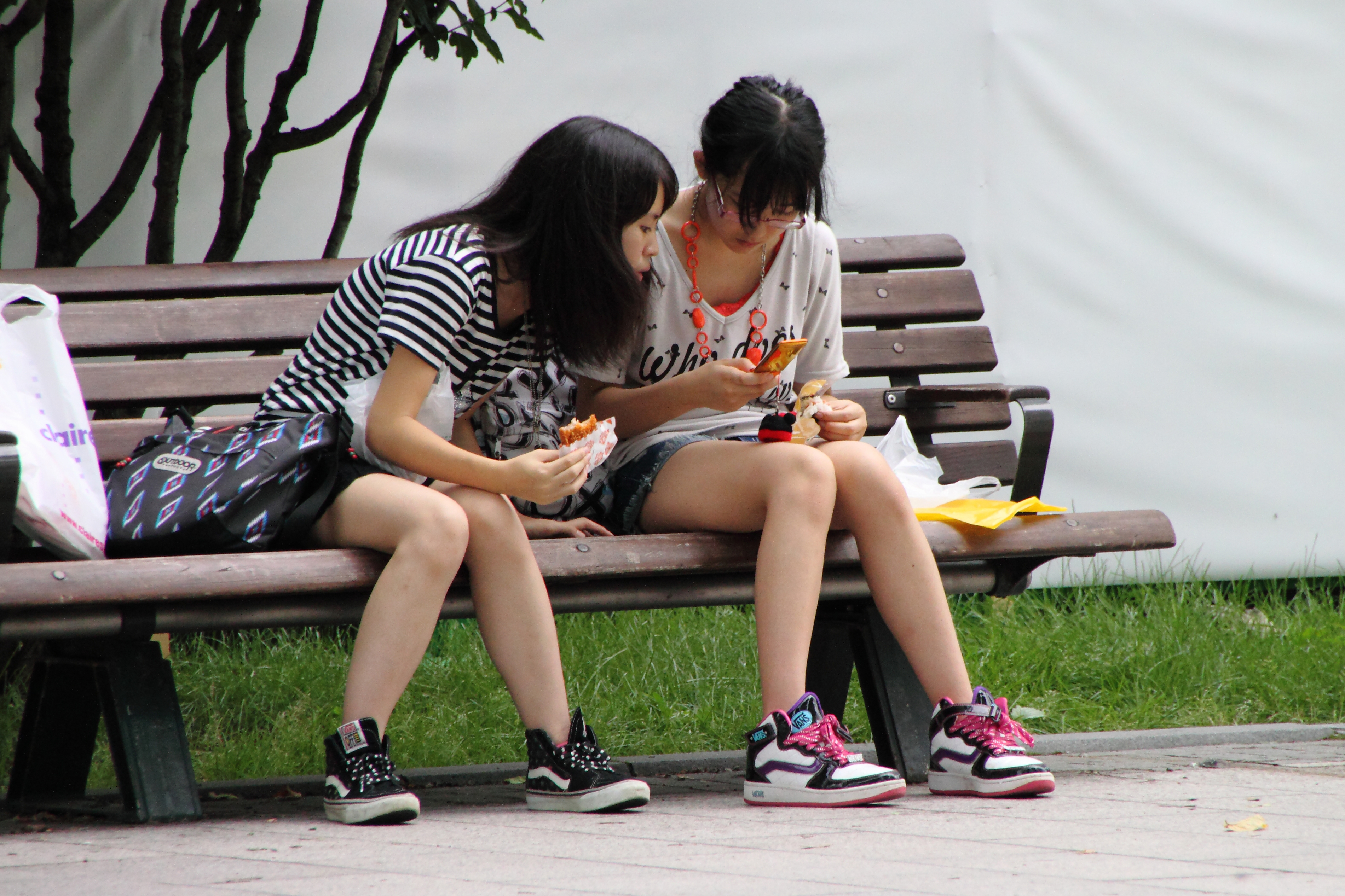 ケータイに見入る少女。 皆、ヒマさえあればケータイ弄ってるけど、 ガラパゴス携帯でそんな目を惹くようなコンテンツってあるのかぁ？ ガラケー時代、ぜんぜん携帯を使わなかったから（＆携帯キライだったから）よくワカラン。 一転してiPhoneになった今は、もう手放せない存在ですけれどもぉ。 （四六時中、携帯を弄る高校生のように常にiPhoneは欠かせない・・・）